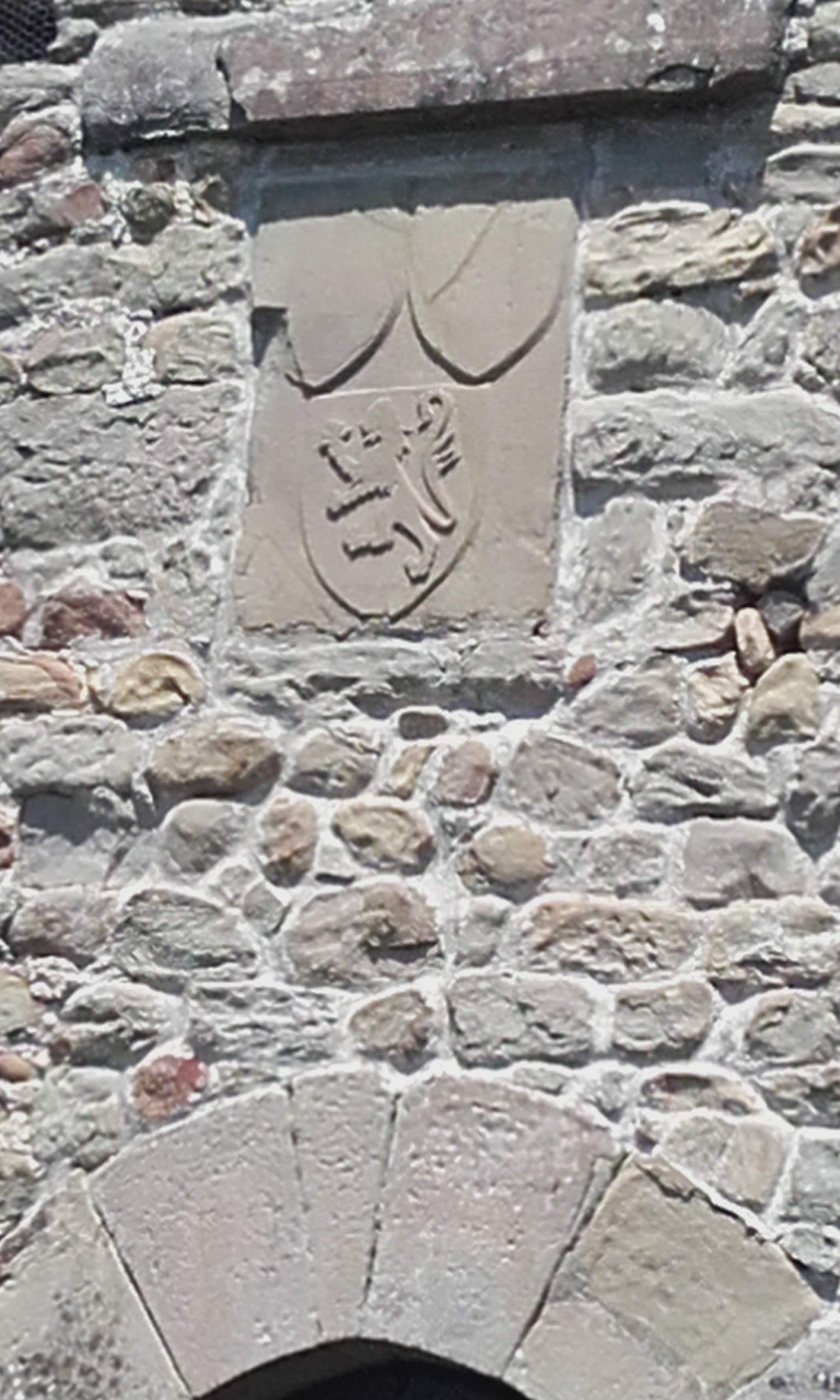 Lev nad brankou Poslední záchrany na hradě Montecarlo v Itálii. Foto 2016/7, Menhart